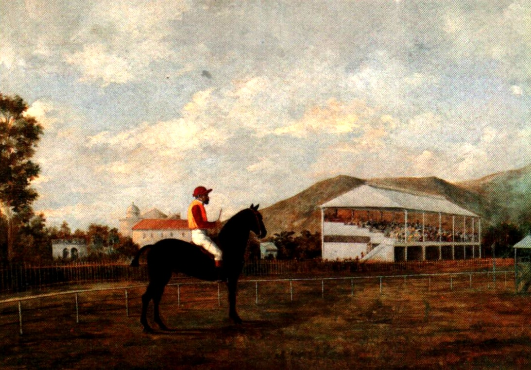 Hipodromo de Sabana Grande.